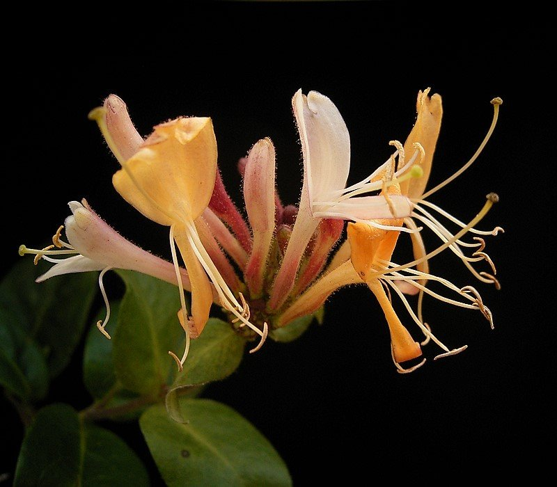 Lonicera periclymenum